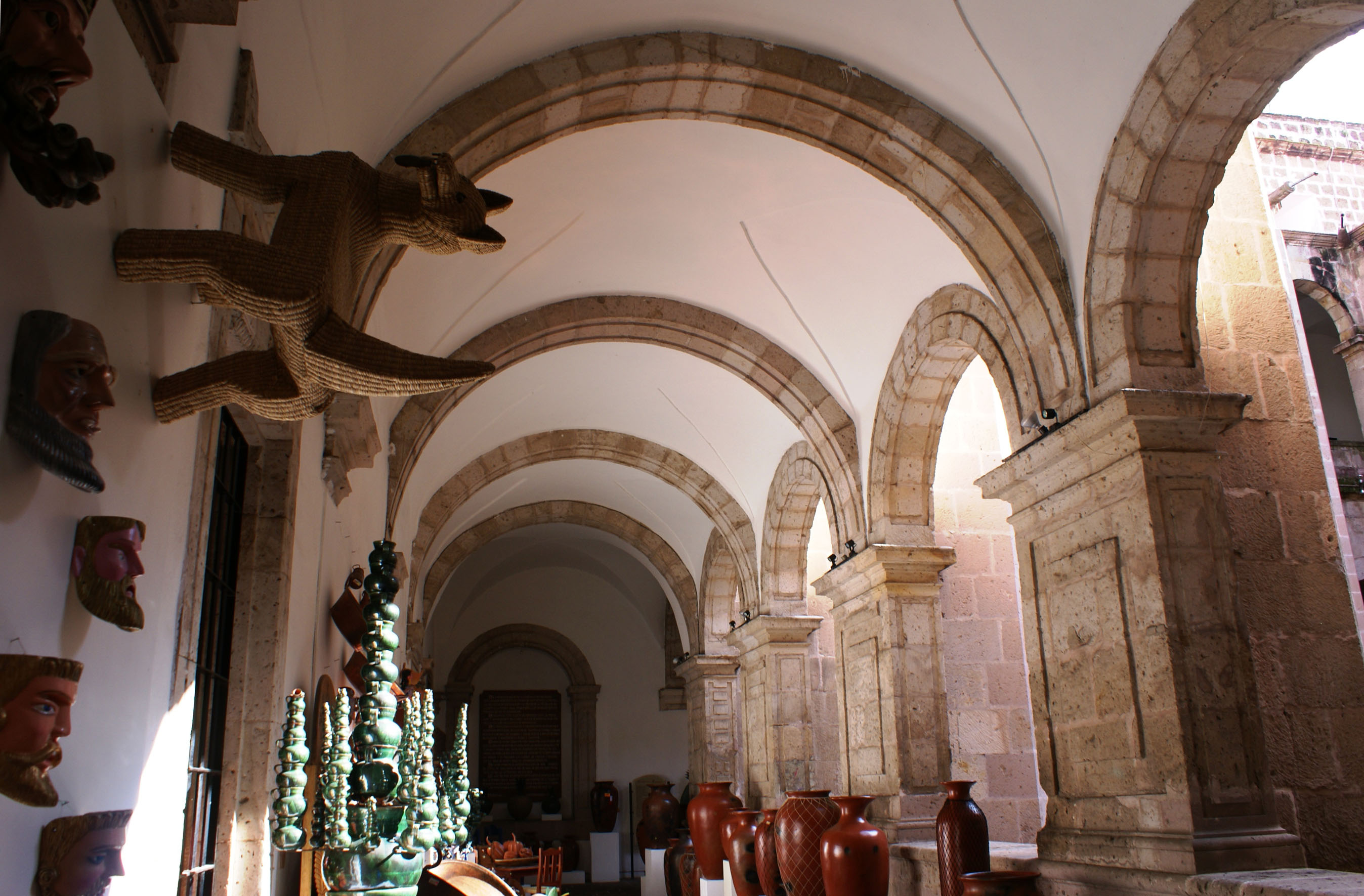 Casa de las Artesanías de Michoacán, recinto cultural público ubicado en la ciudad de Morelia, Michoacán, México; enfocado en la conservación y difusión del arte popular de las distintas regiones del estado, tiene su sede en un ex convento del siglo XVI.